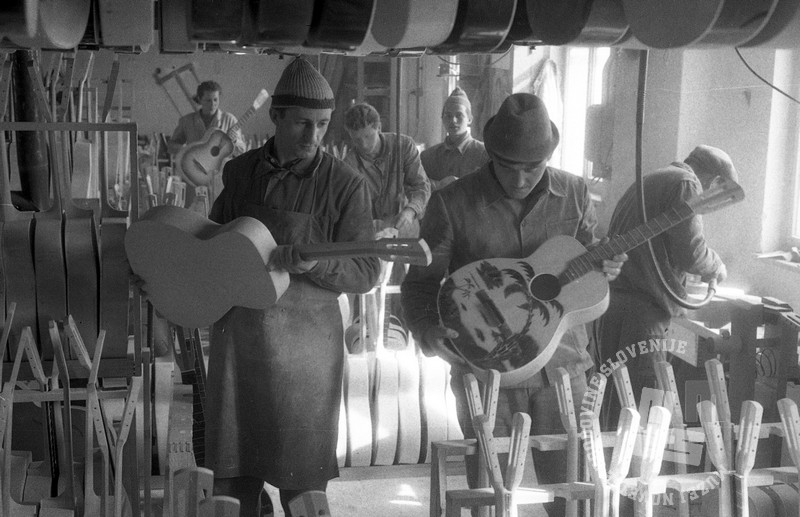 Kitare iz mengeške Melodije.